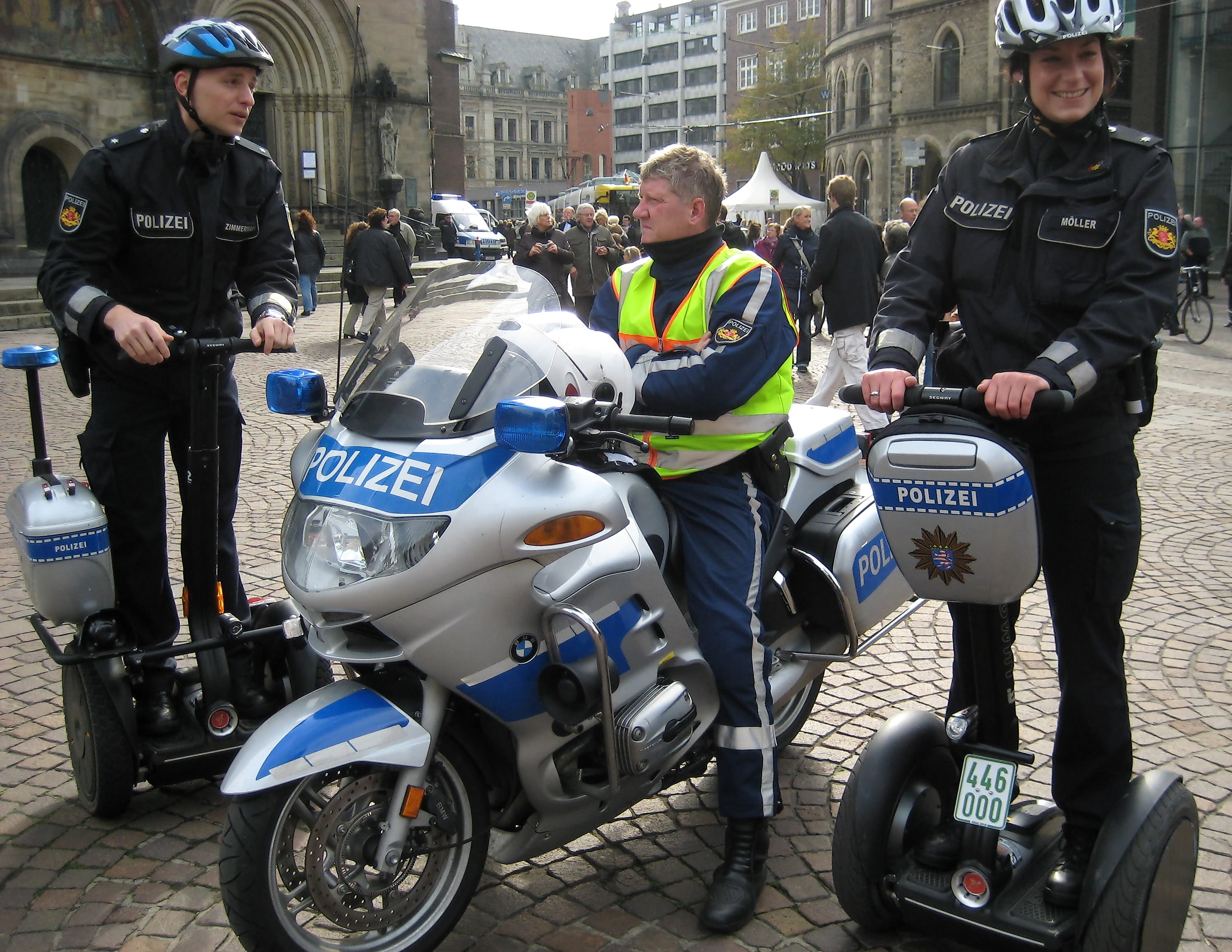 Polizeivollzugsbeamte der Polizei Bremen (mit Polizeimotorrad und Segway PT-Patrouillenfahrzeugen) bei einer Großveranstaltung. Fotoaufnahme beim Bürgerfest im Rahmen der offiziellen Feiern zum 20. Tag der Deutschen Einheit vom 1.–3. Oktober 2010 in Bremen, hier auf dem Grasmarkt gegenüber vom Dom.